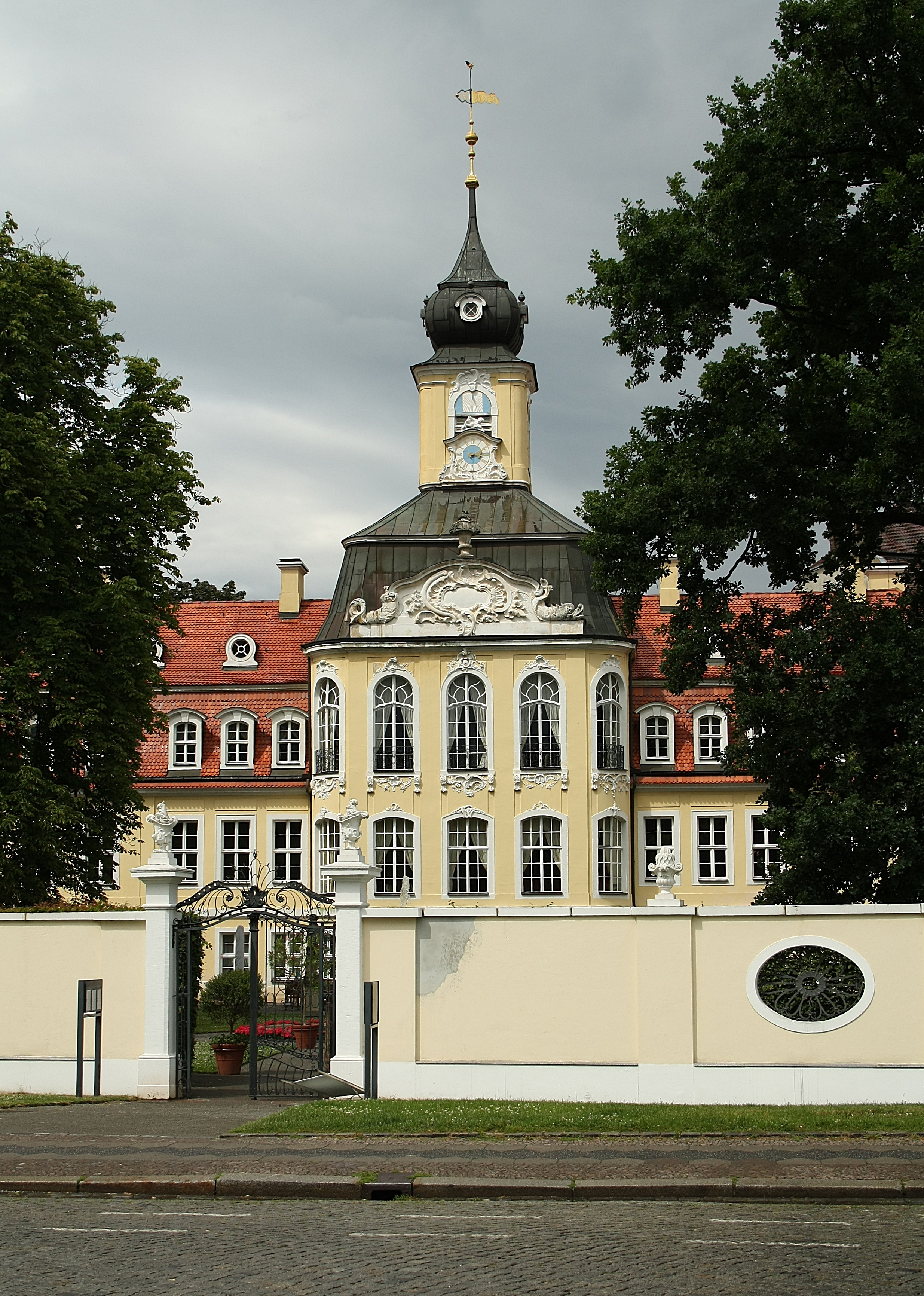 Das Gohliser Schlösschen in Leipzig (Poetenweg)